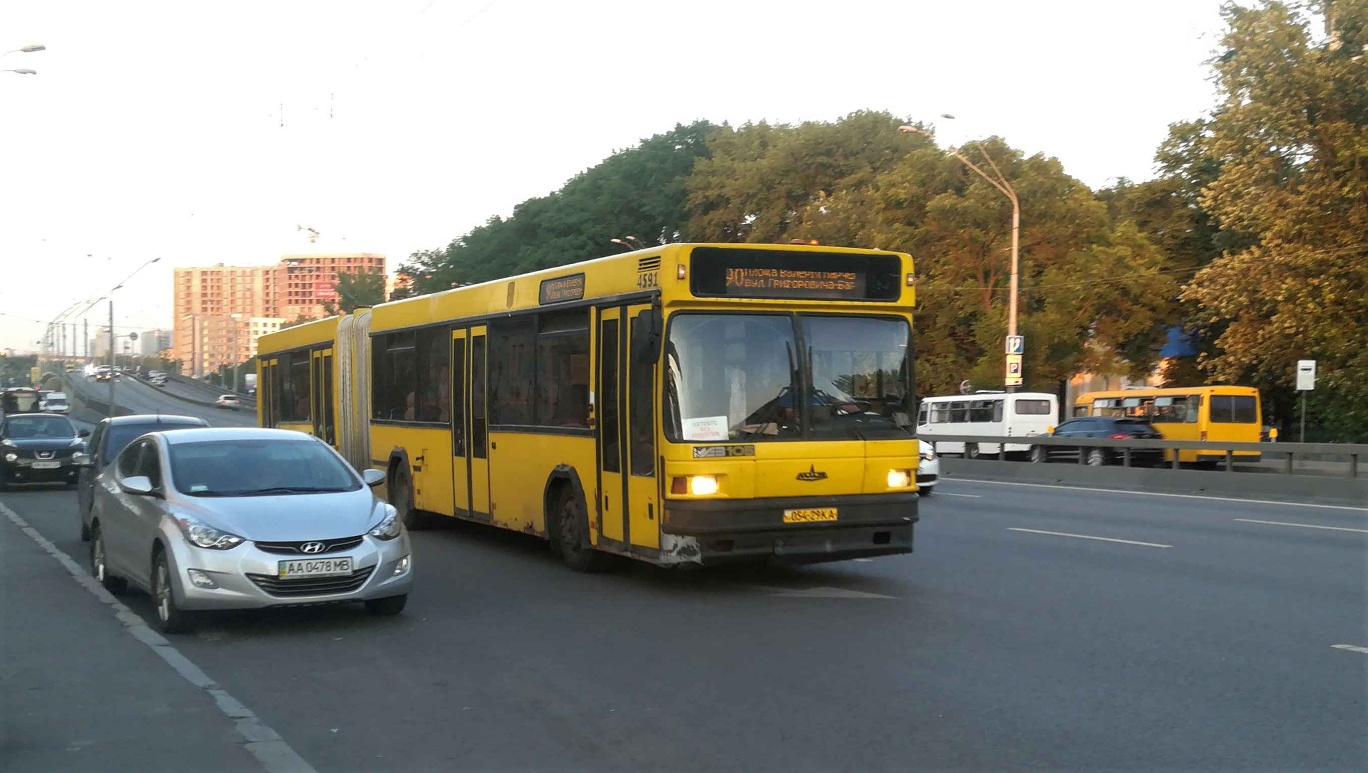 Автобус МАЗ-105 №4591 на проспекті Перемоги поблизу ст. м. "Нивки" в Києві